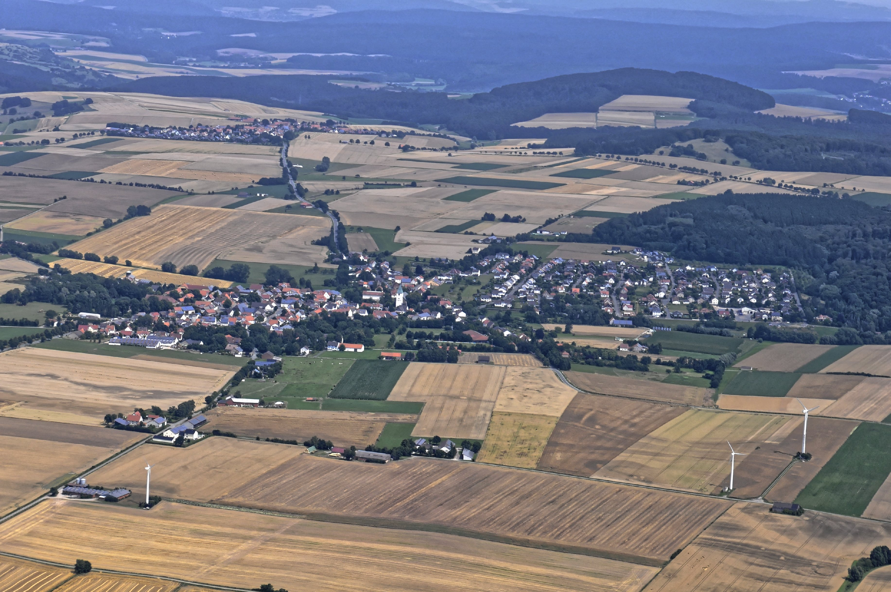 Bilder vom Flug Nordholz-Hammelburg 2015: Bühne (Borgentreich)